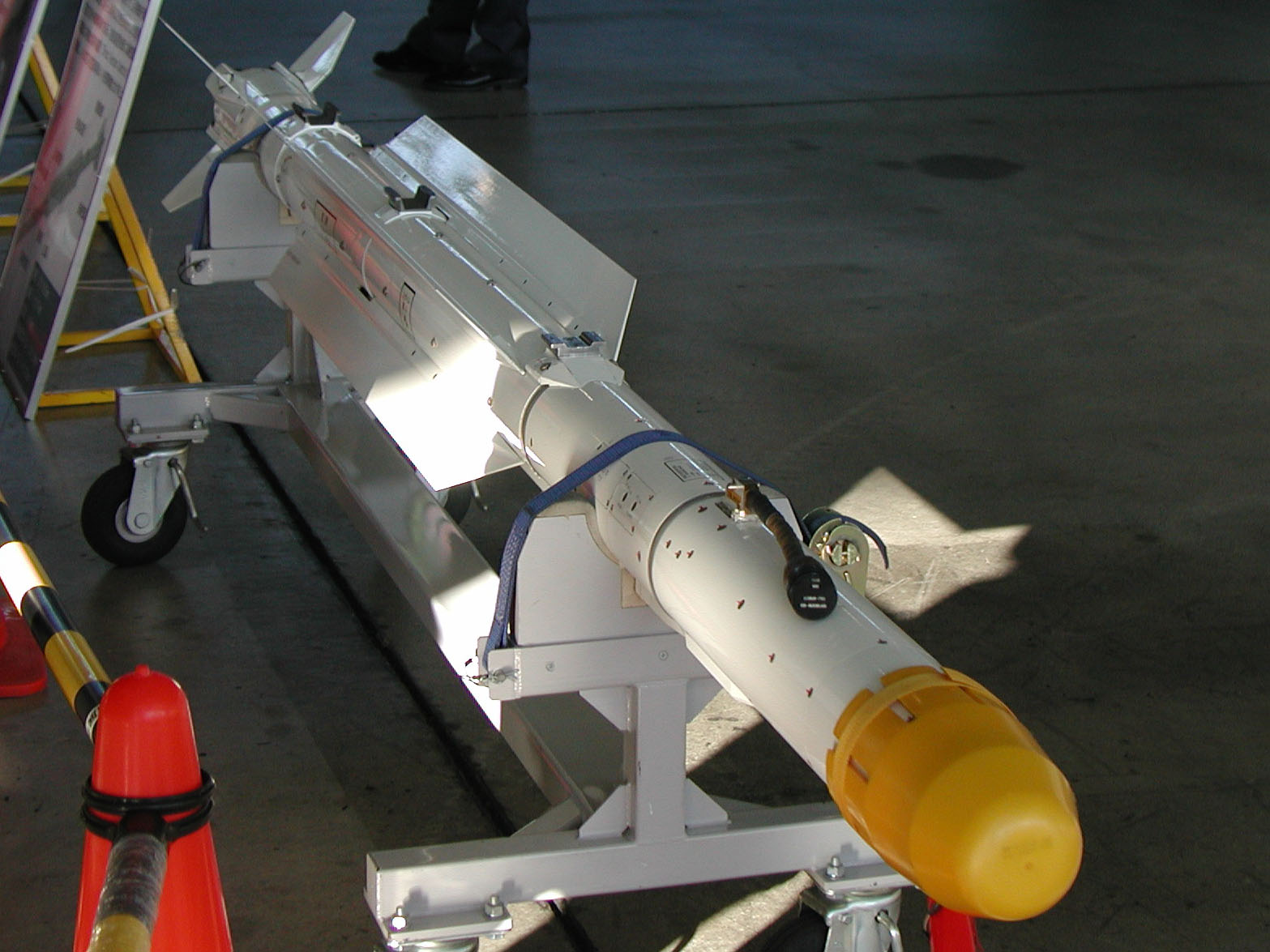 AAM-5 04式空対空誘導弾、航空自衛隊岐阜基地にて撮影。